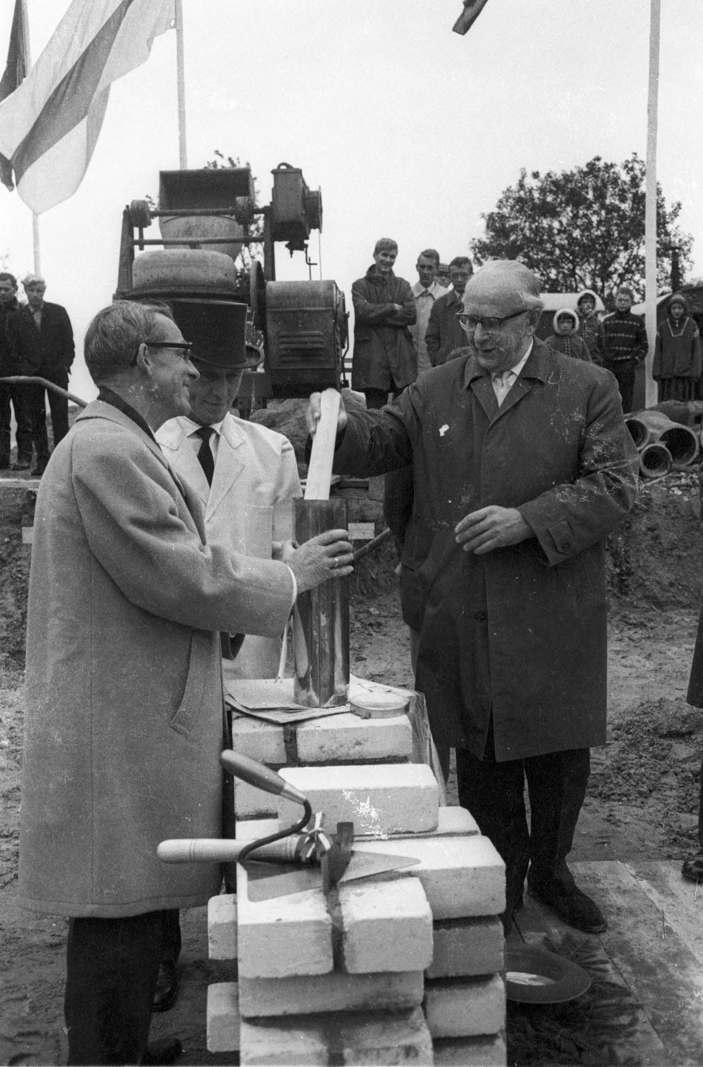 Links Kultusminister Claus Joachim von Heydebreck, rechts der Vorsitzende der Stiftung Deutsch-Nordische Burse, Staatssekretär Franz Kock.